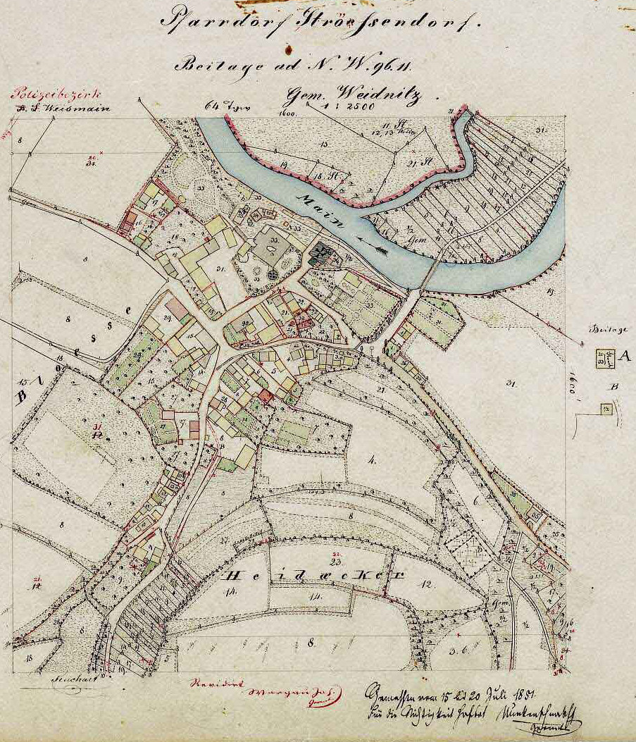 Ortsplan von Strössendorf, M 1:2500